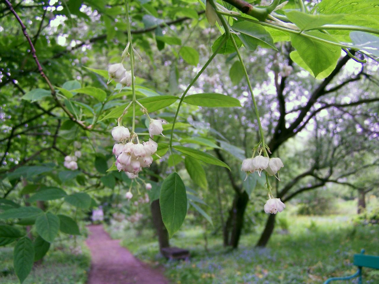 Staphylea pinnata (pl. kłokoczka południowa)